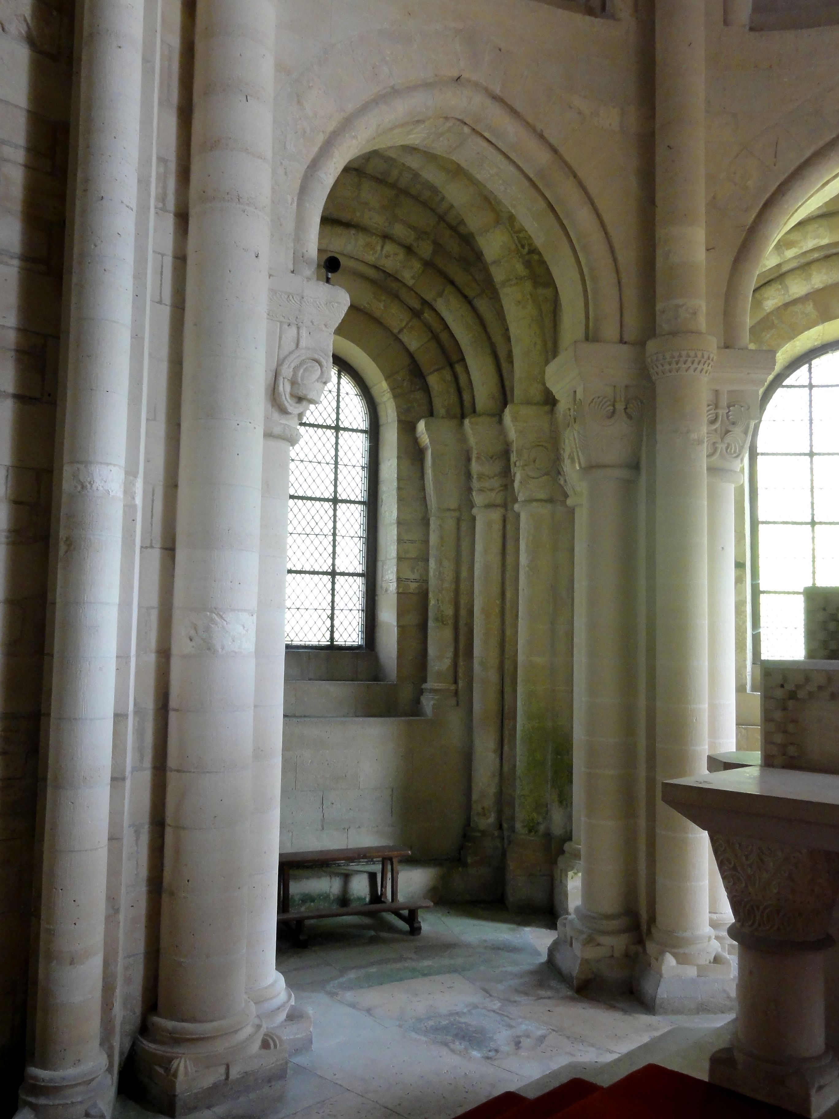 Déambulatoire, première travée (nord).